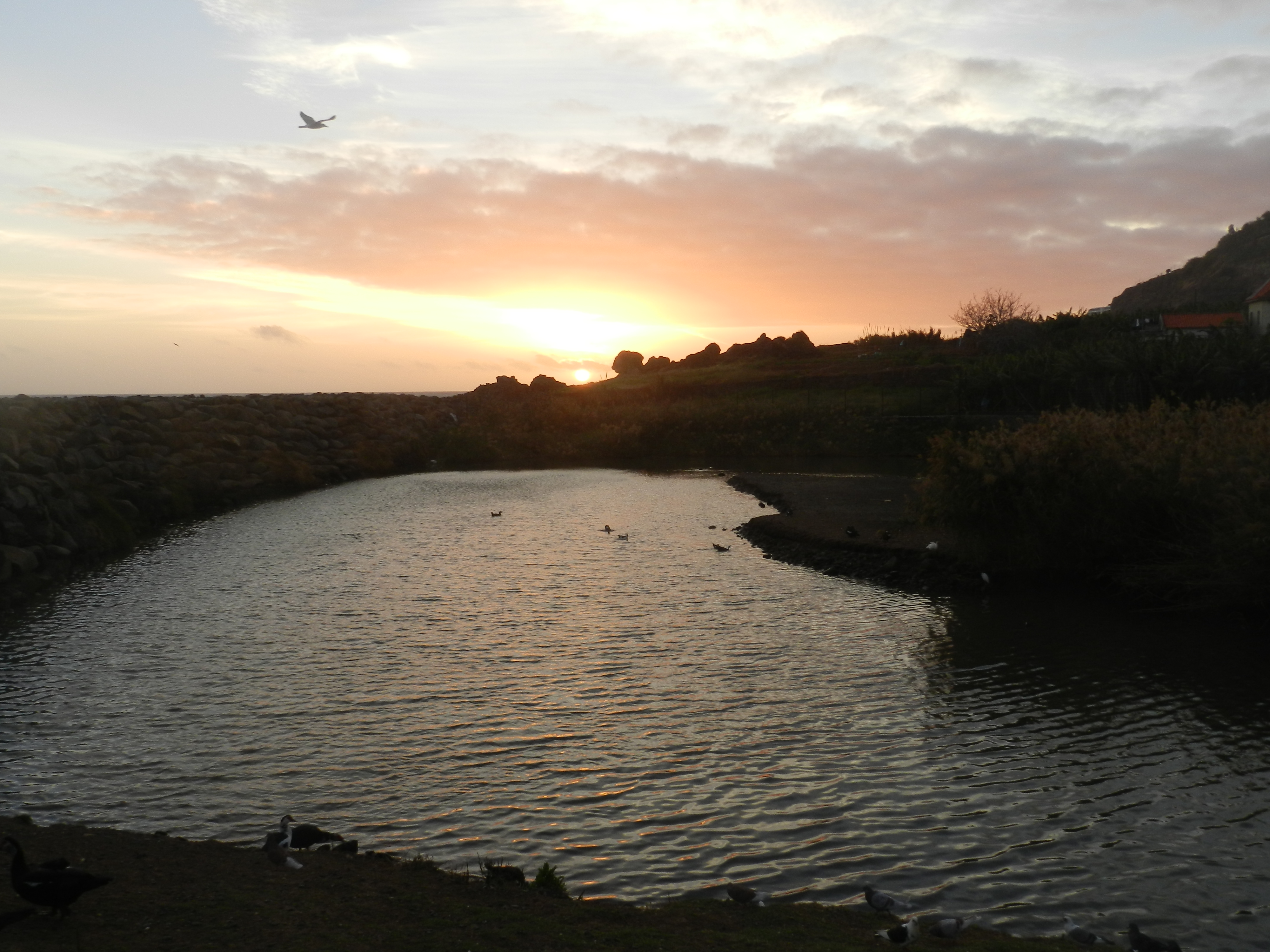 Lagoa do Lugar de Baixo, pôr-do-sol, inverno